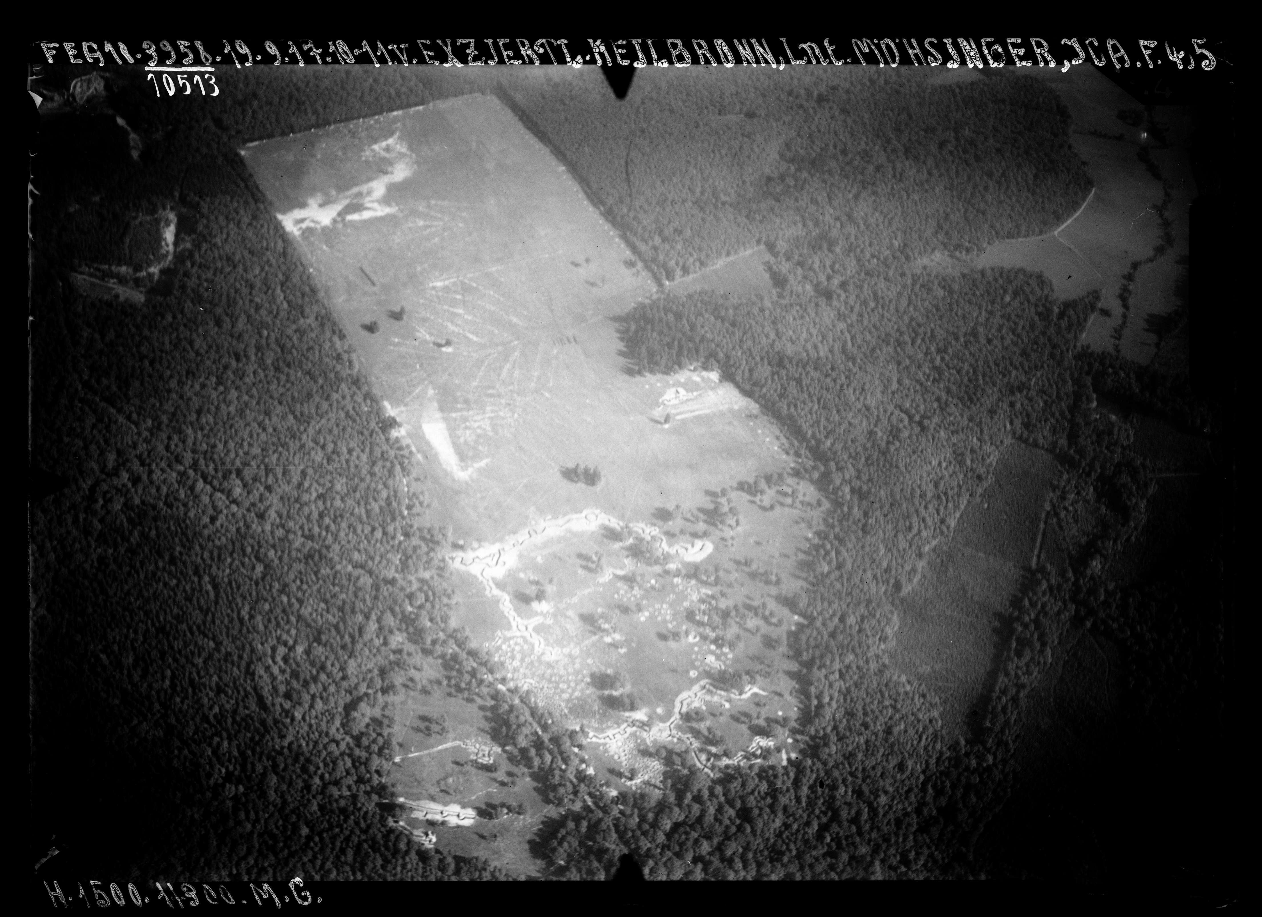 Luftbild des Exerzierplatzes (der heutigen Waldheide) in Heilbronn im Jahr 1917, vermutlich zu militärischen Zwecken aufgenommen